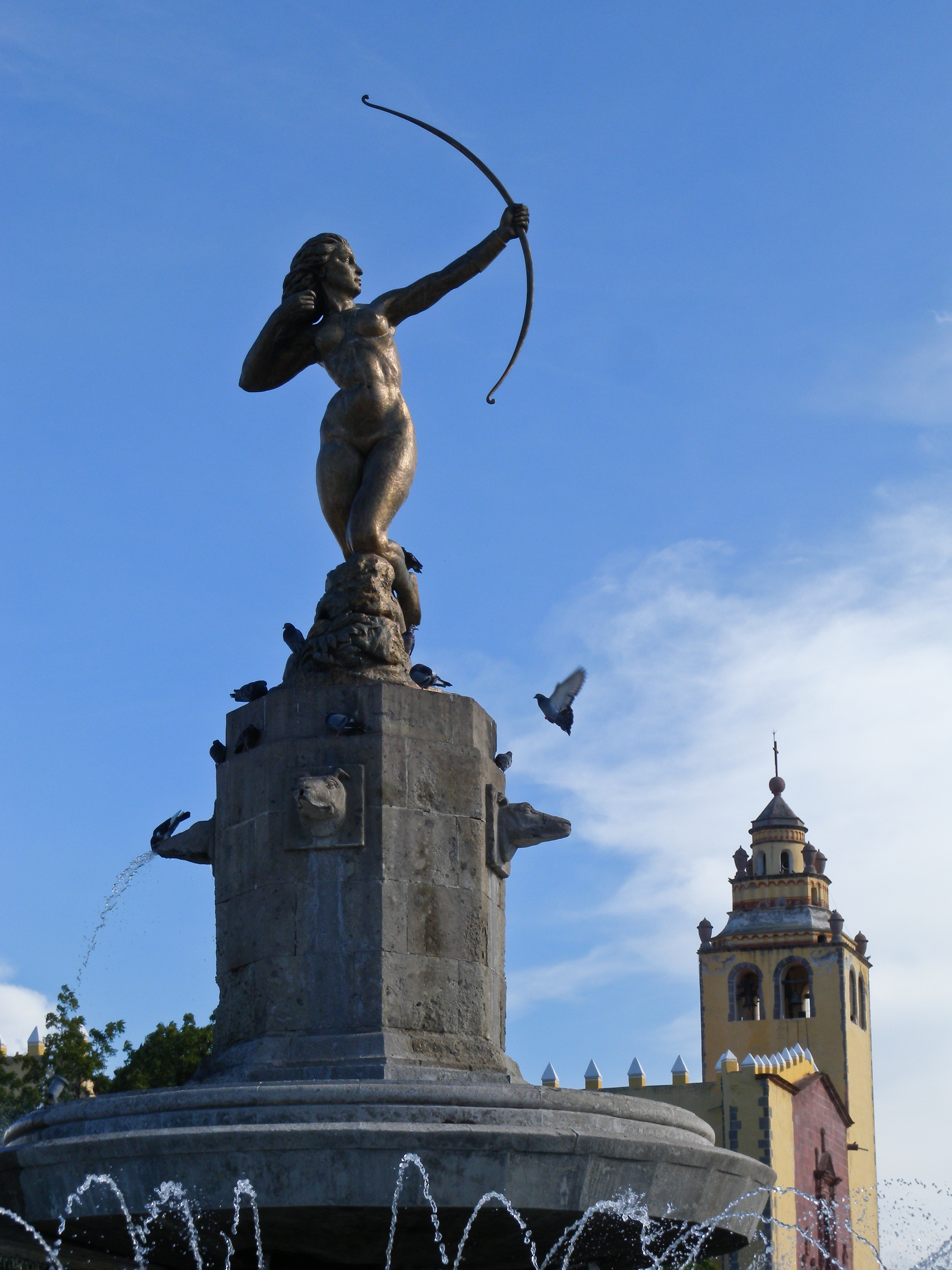 Ixmiquilpan, Hidalgo, México